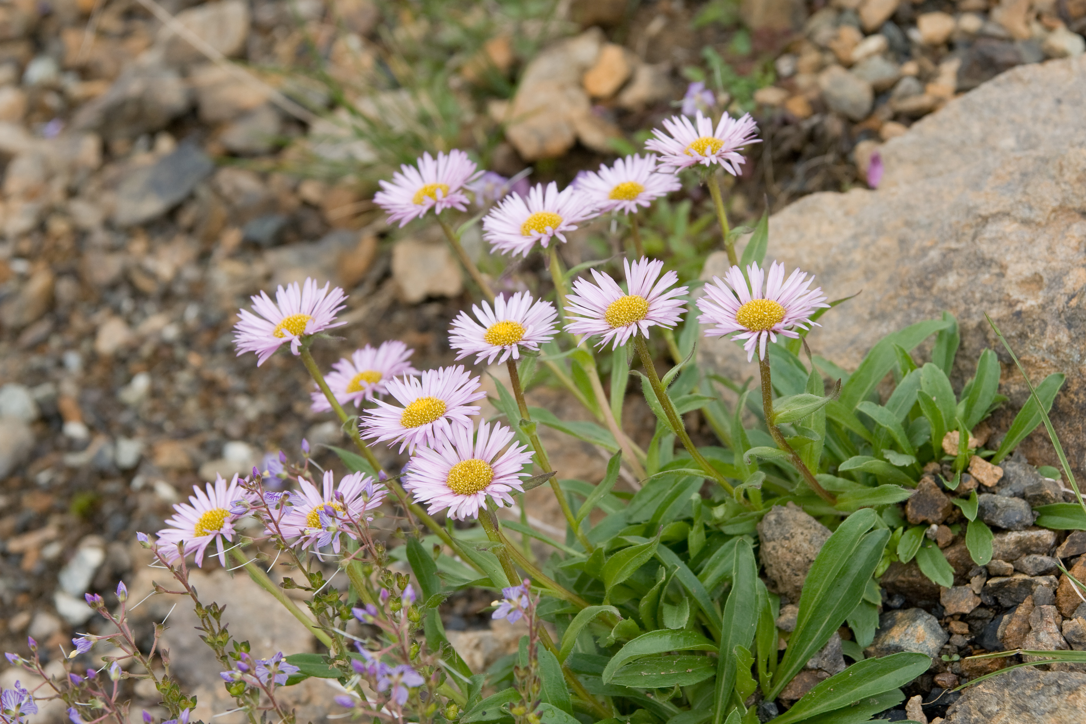 ミヤマアズマギク (学名：Erigeron thunbergii var. glabratus)